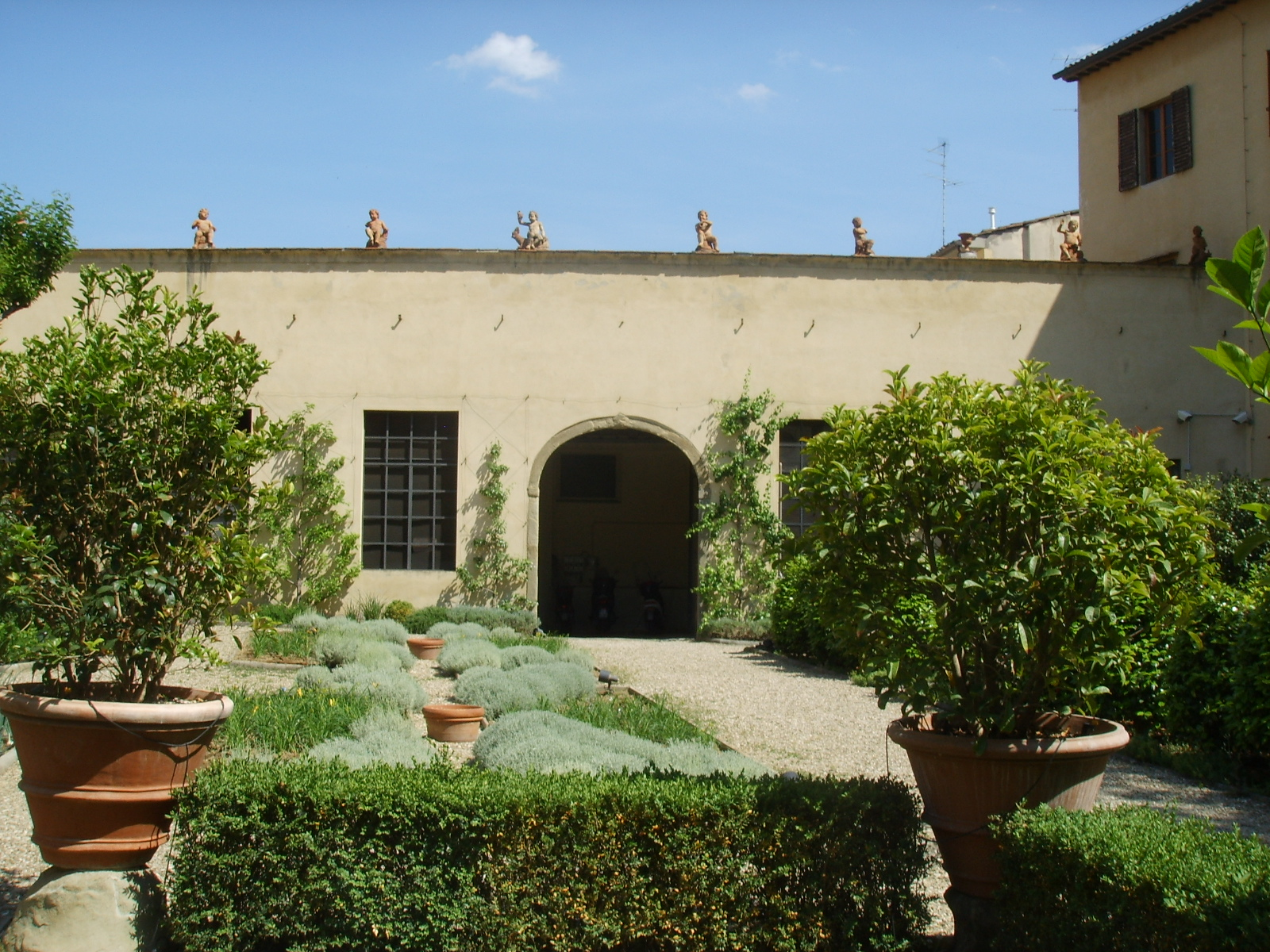 see description